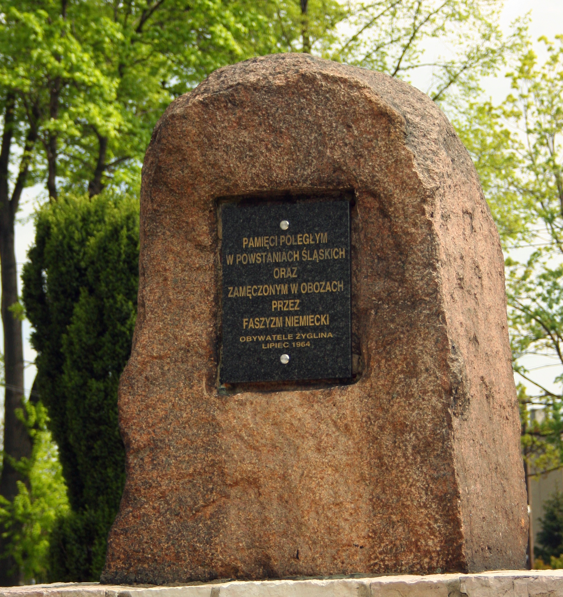 Pomnik w centrum Żyglina (Miasteczko Śląskie), Polska, województwo śląskie, powiat tarnogórski